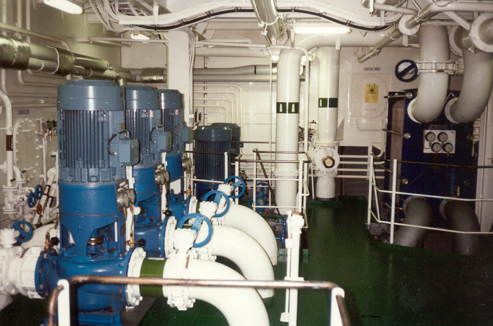 Seekühlwasserpumpen und Plattenwärmetauscher